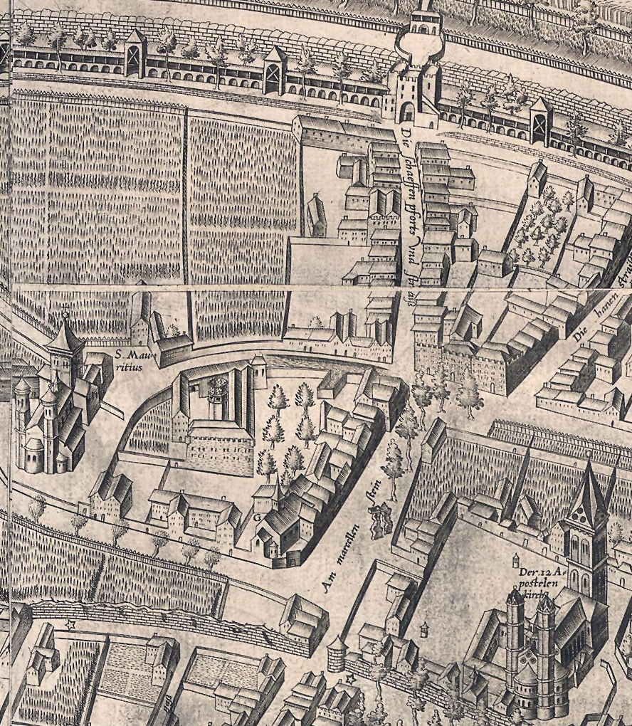 Ausschnitt des Mercator - Stadtplanes, Bereich Schaafenstraße und Tor.